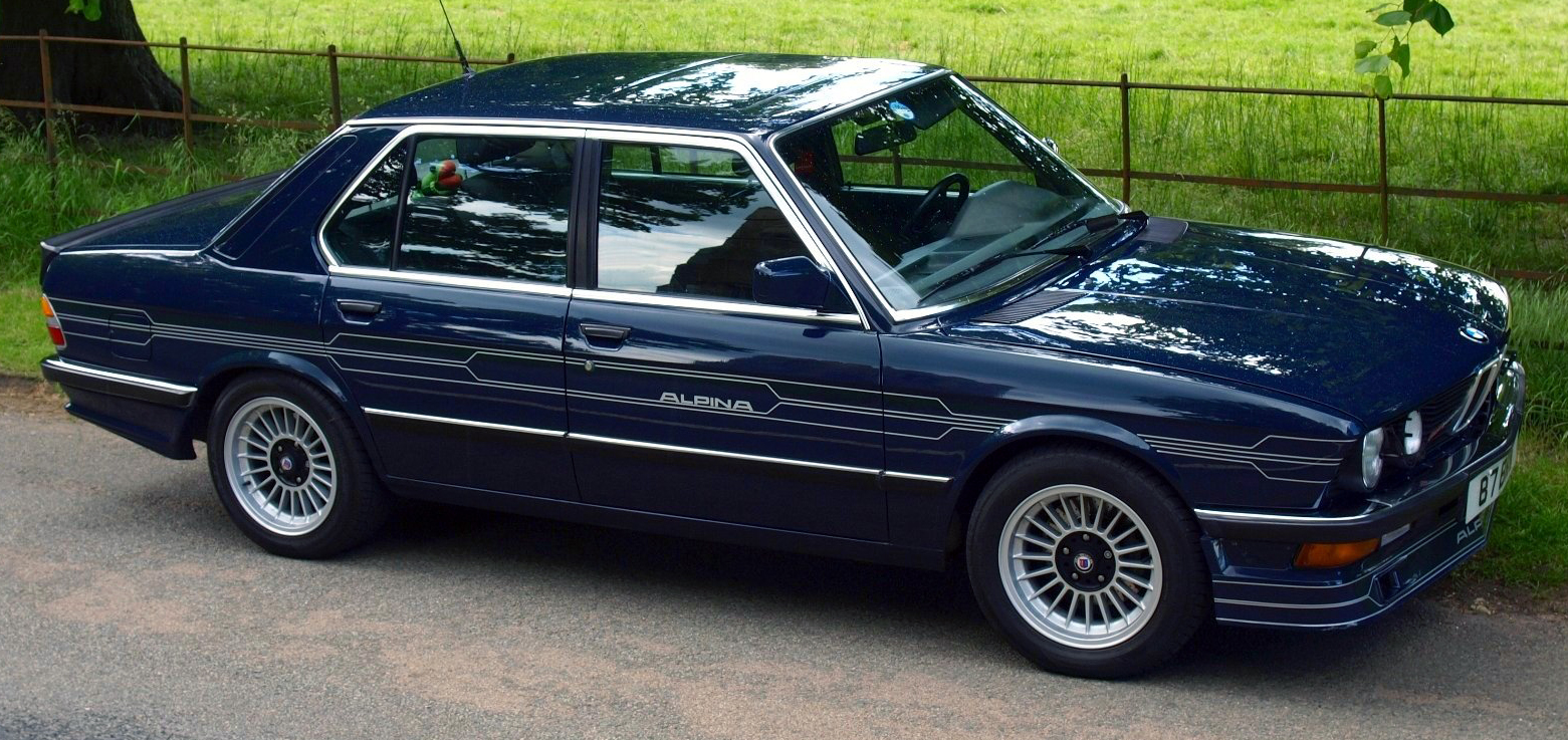 1984 Alpina B7 Turbo Saloon (BMW E28 5-series)